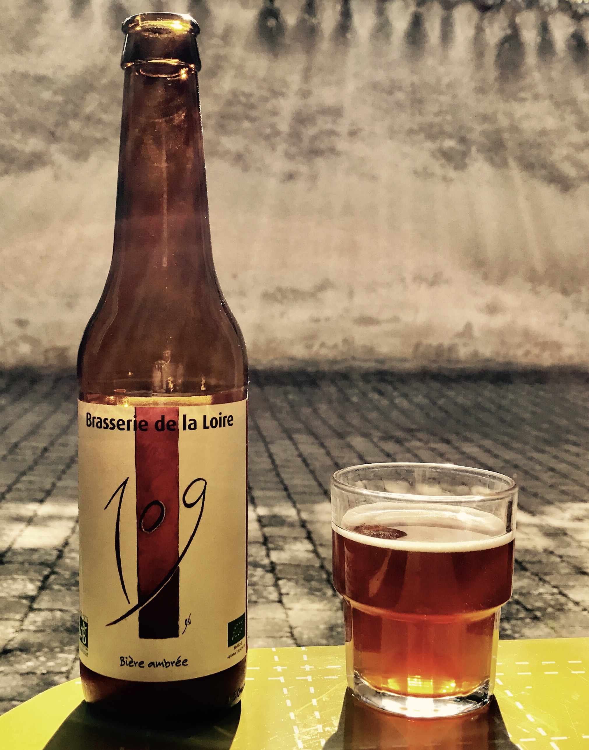 Bière 109 de la brasserie de la Loire (Open Food Facts).